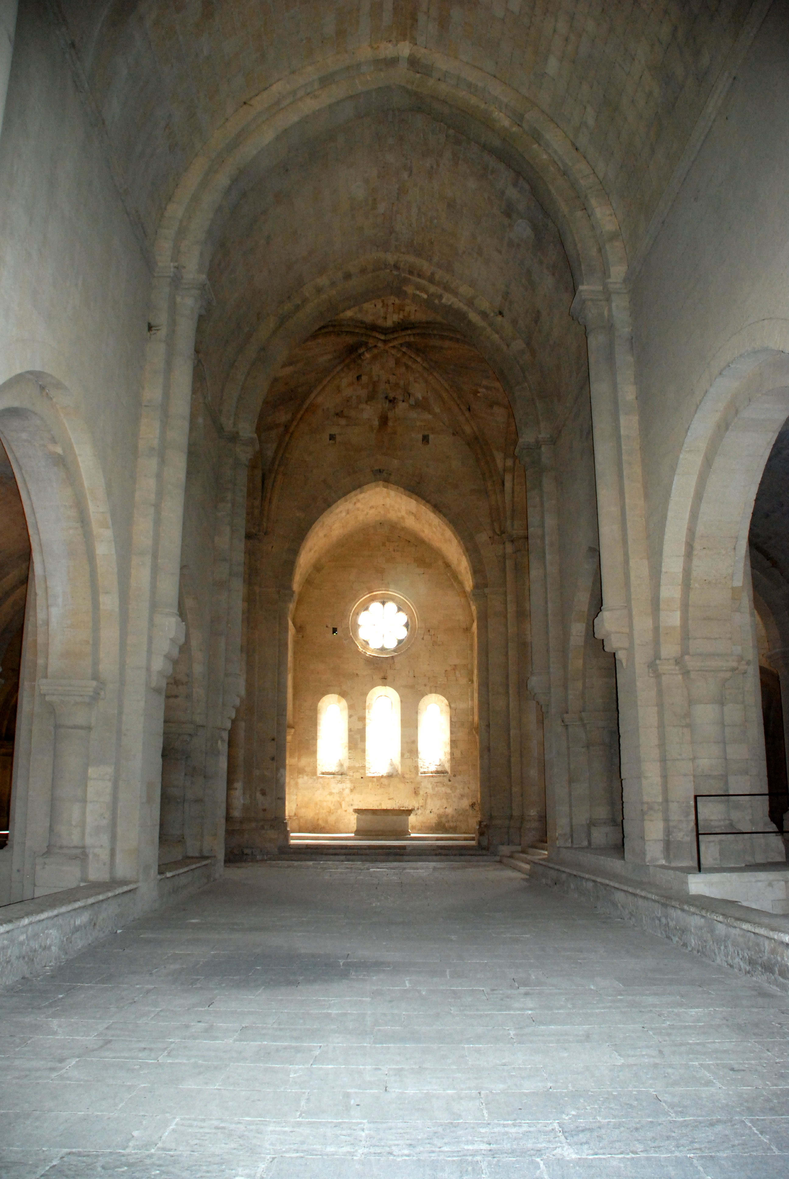 France - Provence - Abbaye de Silvacane